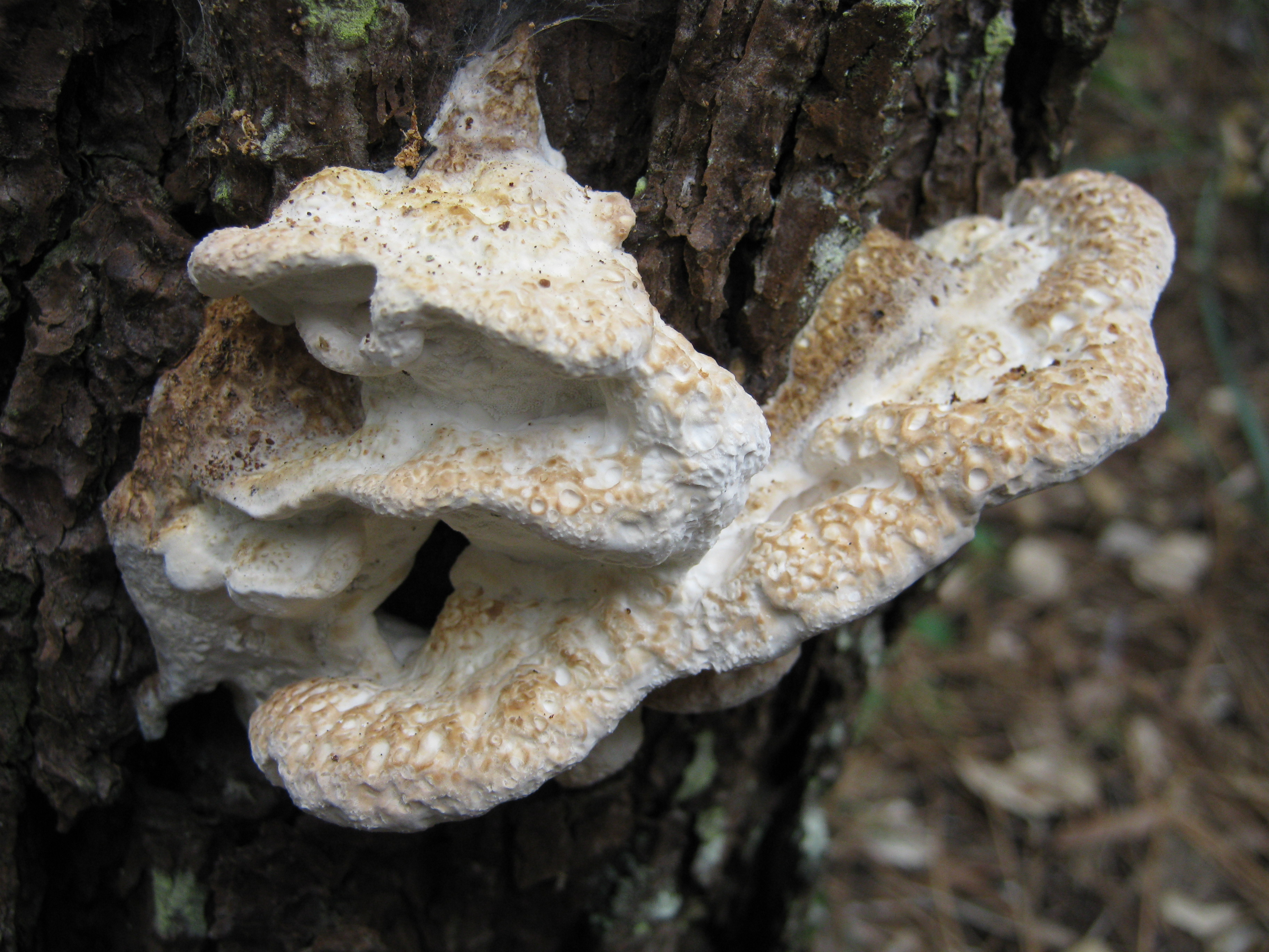 Oligoporus guttulatus